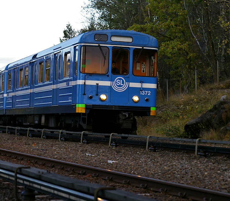 C14 1372 främst i ett tunnelbanetåg mot Norsborg i Bredäng 11 Oktober 2007.